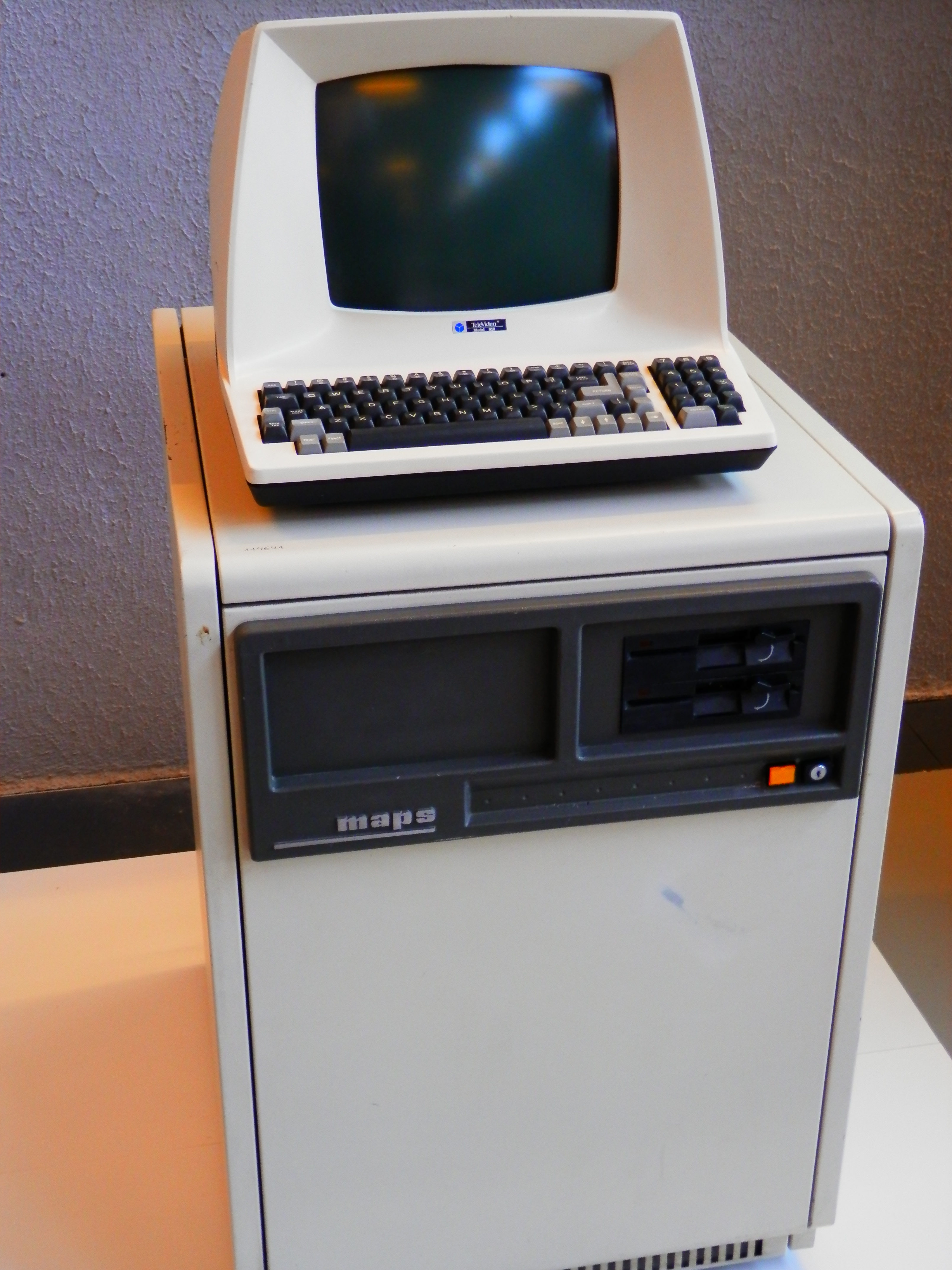 Fotografia d'un ordinador català de la marca MAPS, de l'enginyer Josep Amat i Girbau de l'any 1978.